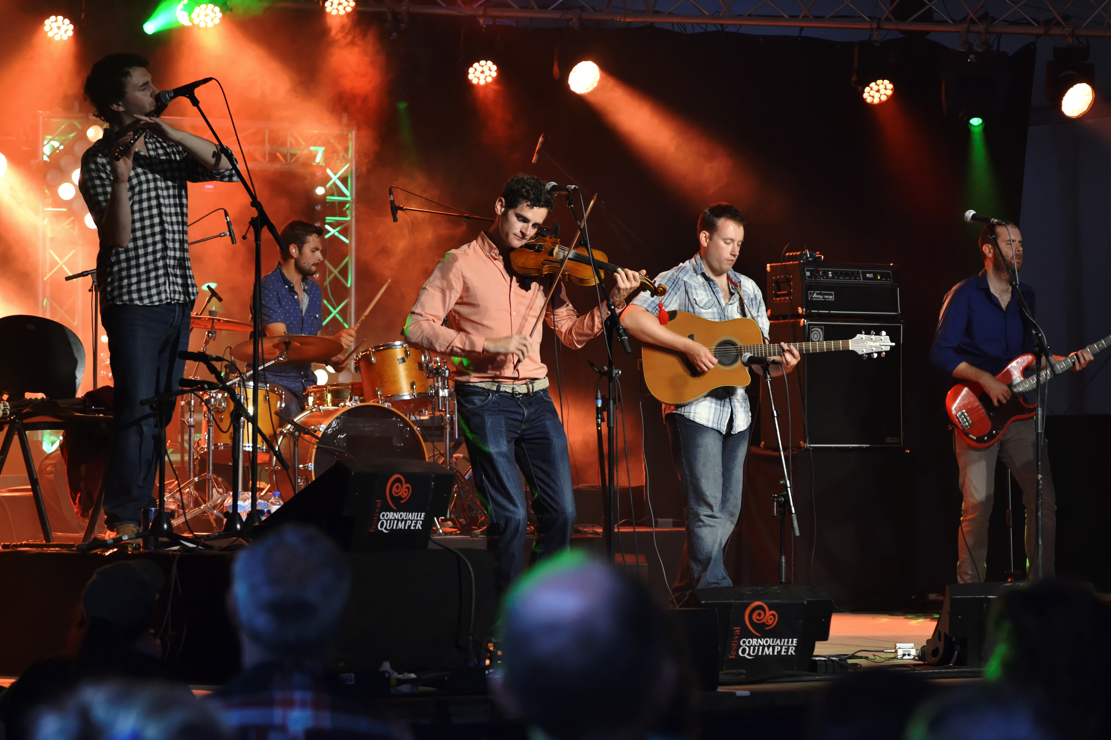 Mànran en concert lors du festival de Cornouaille le samedi 27 juillet 2013 à l'Espace Évêché.